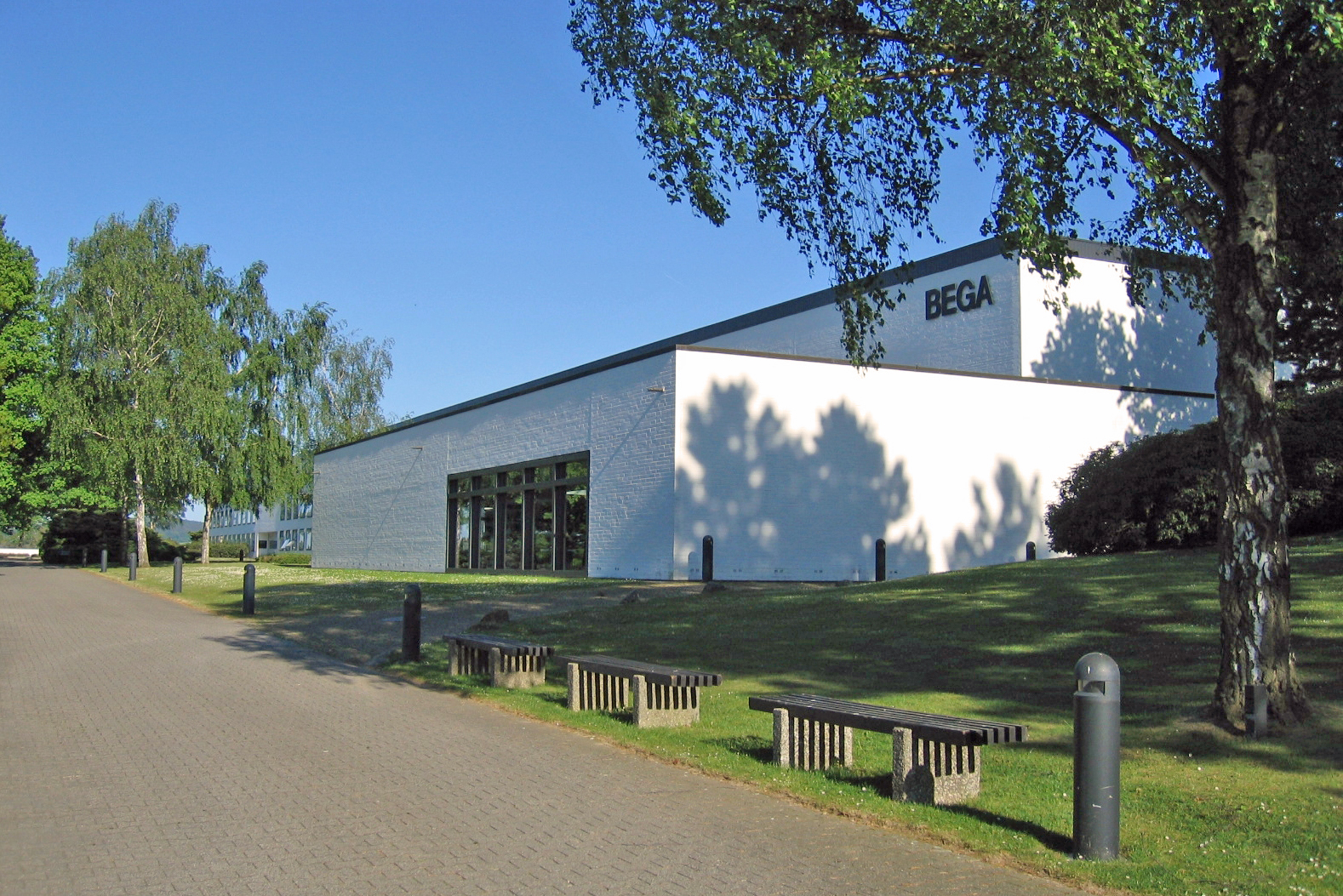 Verwaltungsgebäude der BEGA Gantenbrink-Leuchten KG in Menden.